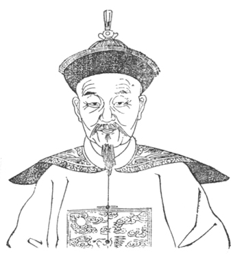 黃施鍔（1673年－1749年），字虞封，号悔斋，江苏吴县（今属苏州市）人。清朝官员。官至淮安府教授。